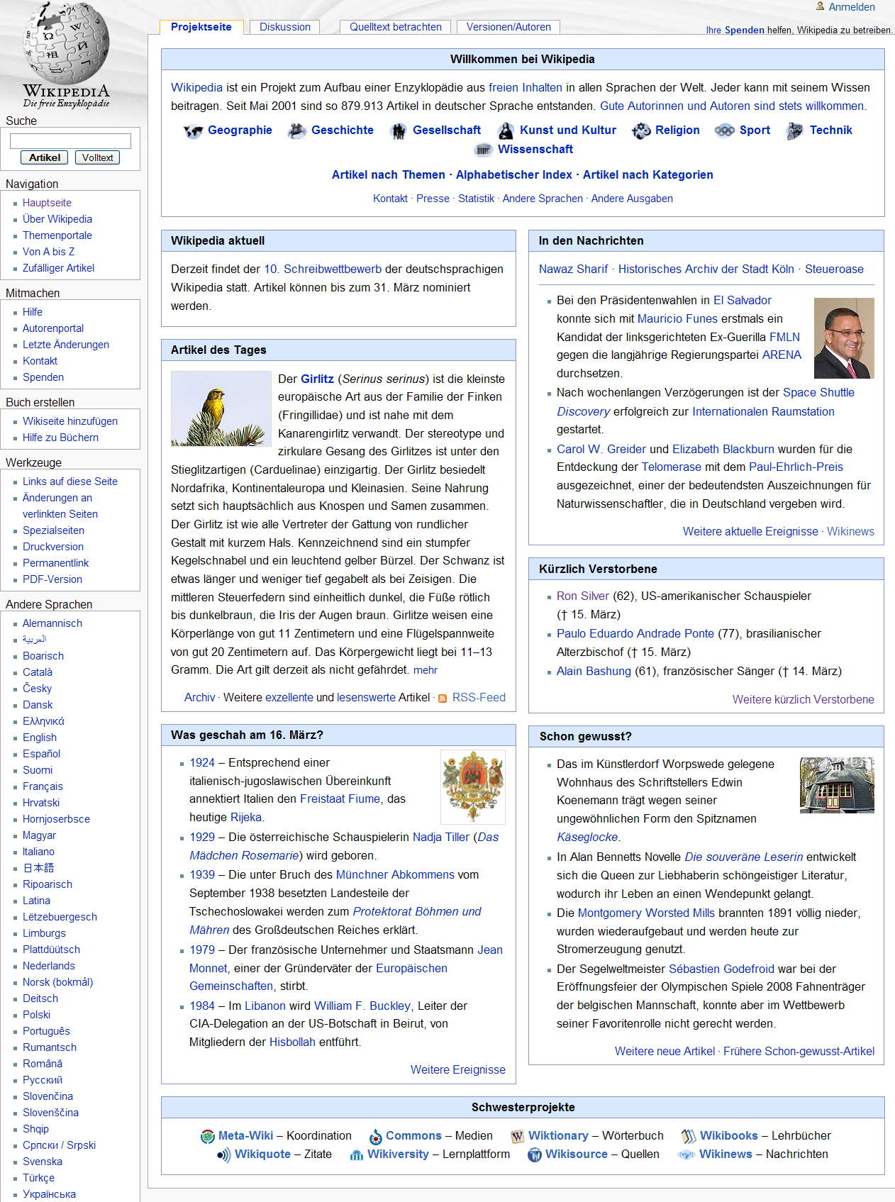 Screenshot der deutschen Wikipedia Hauptseite vom März 2009